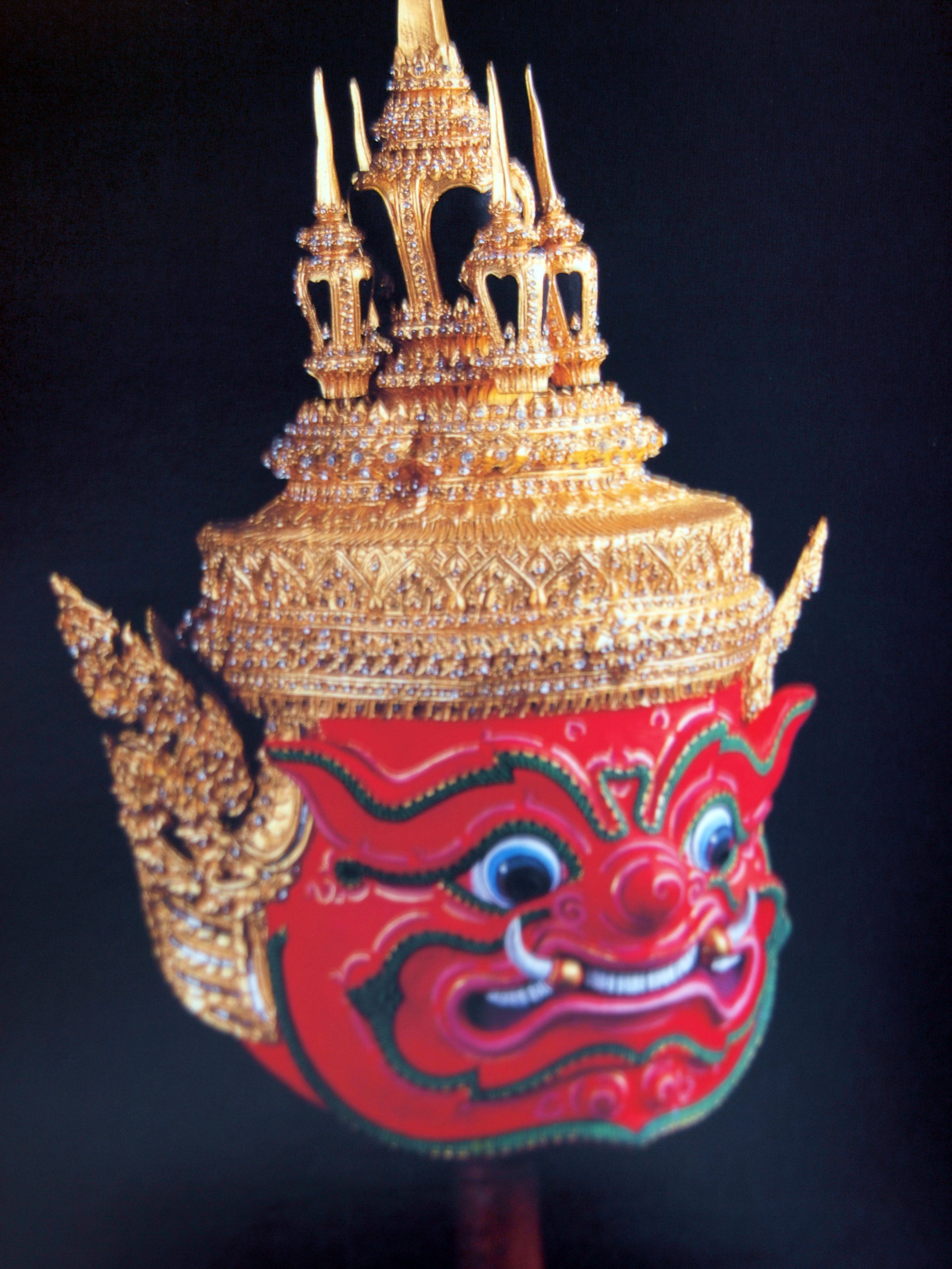 ภาพถ่ายหัวโขนฝ่ายเสนายักษ์อากาศตะไล หน้าสีแดง มงกุฎน้ำเต้า 5 ยอด ถ่ายจากคัตเอาท์เรื่องโขน กรมศิลปกร